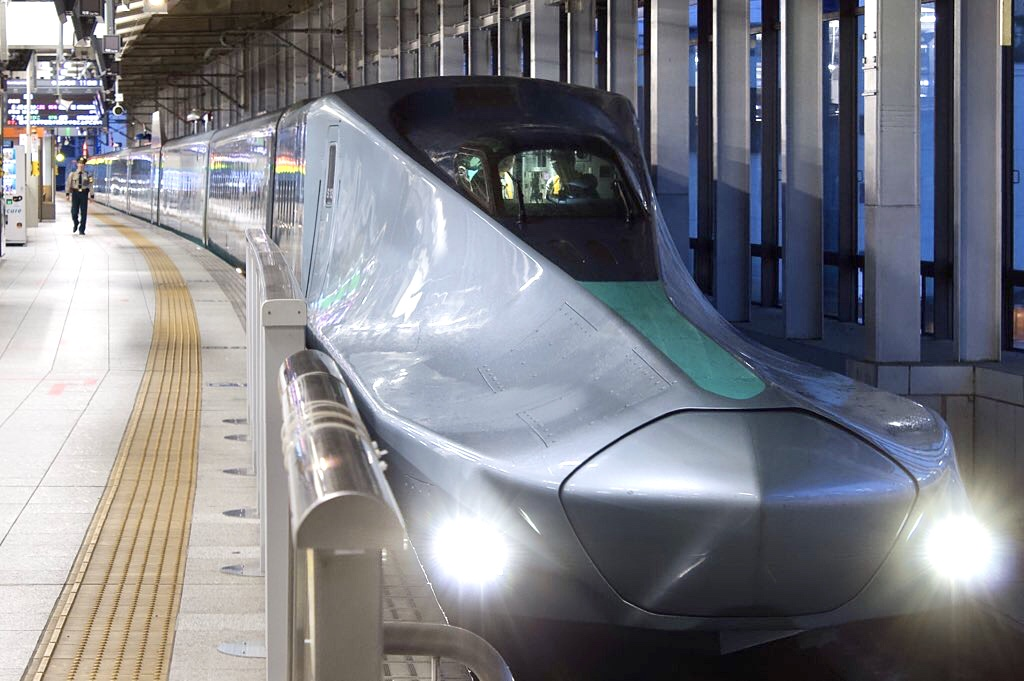 E956形S13編成、2019年10月6日仙台駅にて撮影